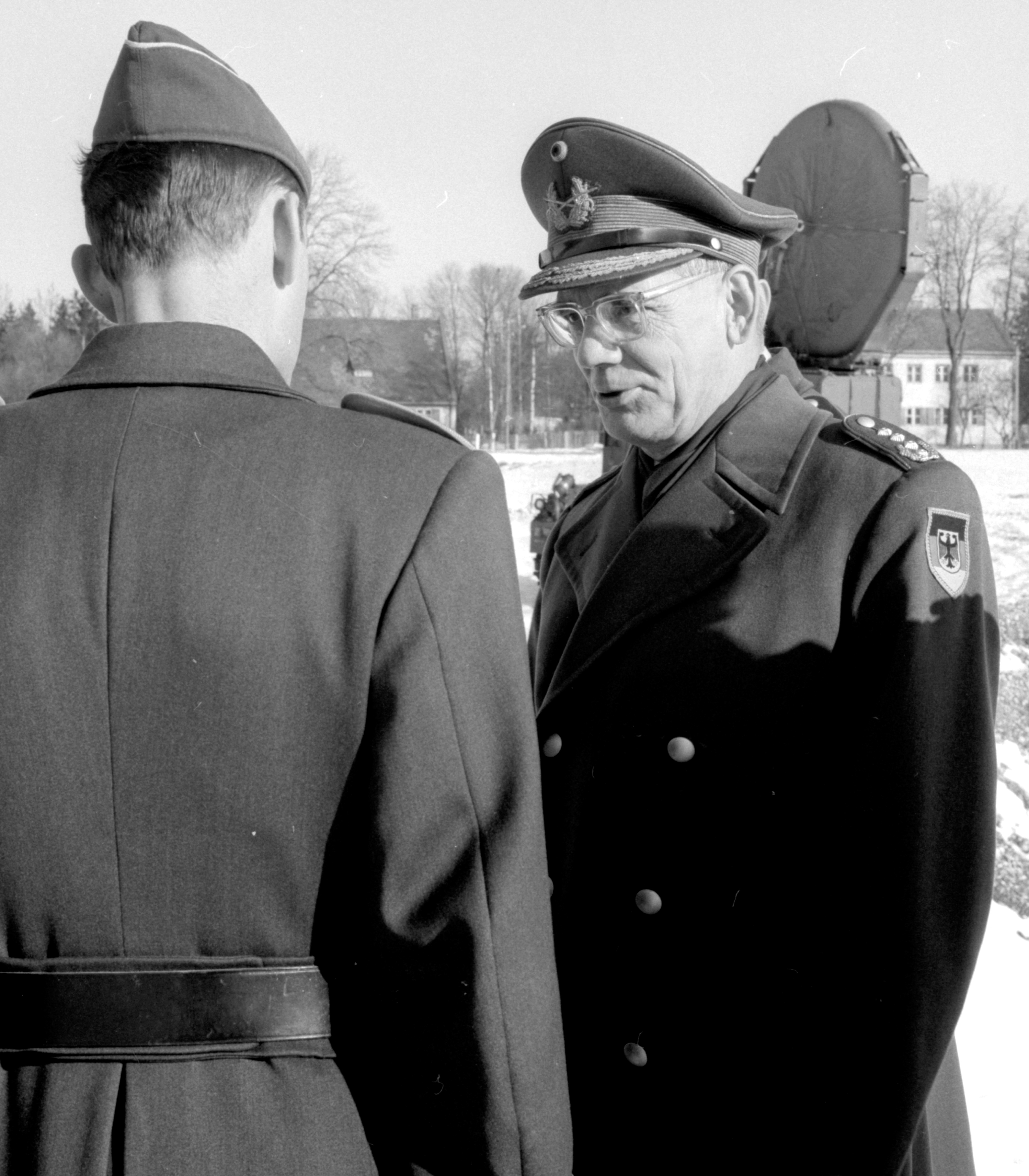 General Ulrich de Maizière, Generalinspekteur der Bundeswehr (25.08.1966 - 31.03.1972), besucht die Panzerbrigade 21 in Augustdorf. ©Bundeswehr/Oed